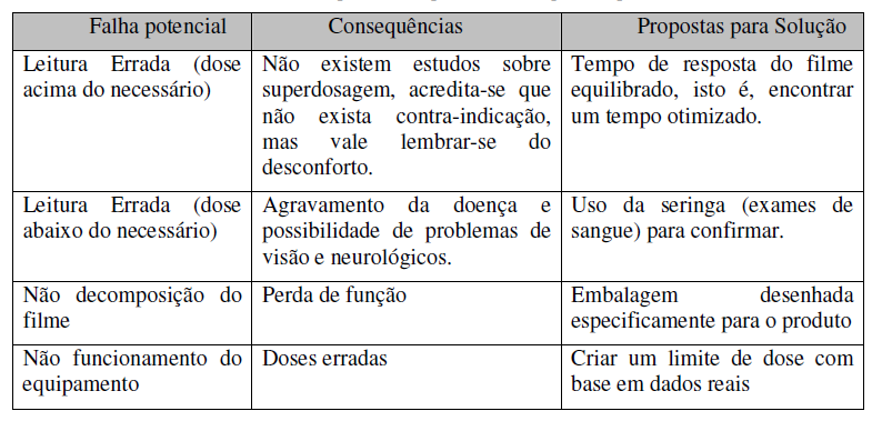 Failure Models Effect Analyze para o caso de projeto do produto, tratamento da icterícia.